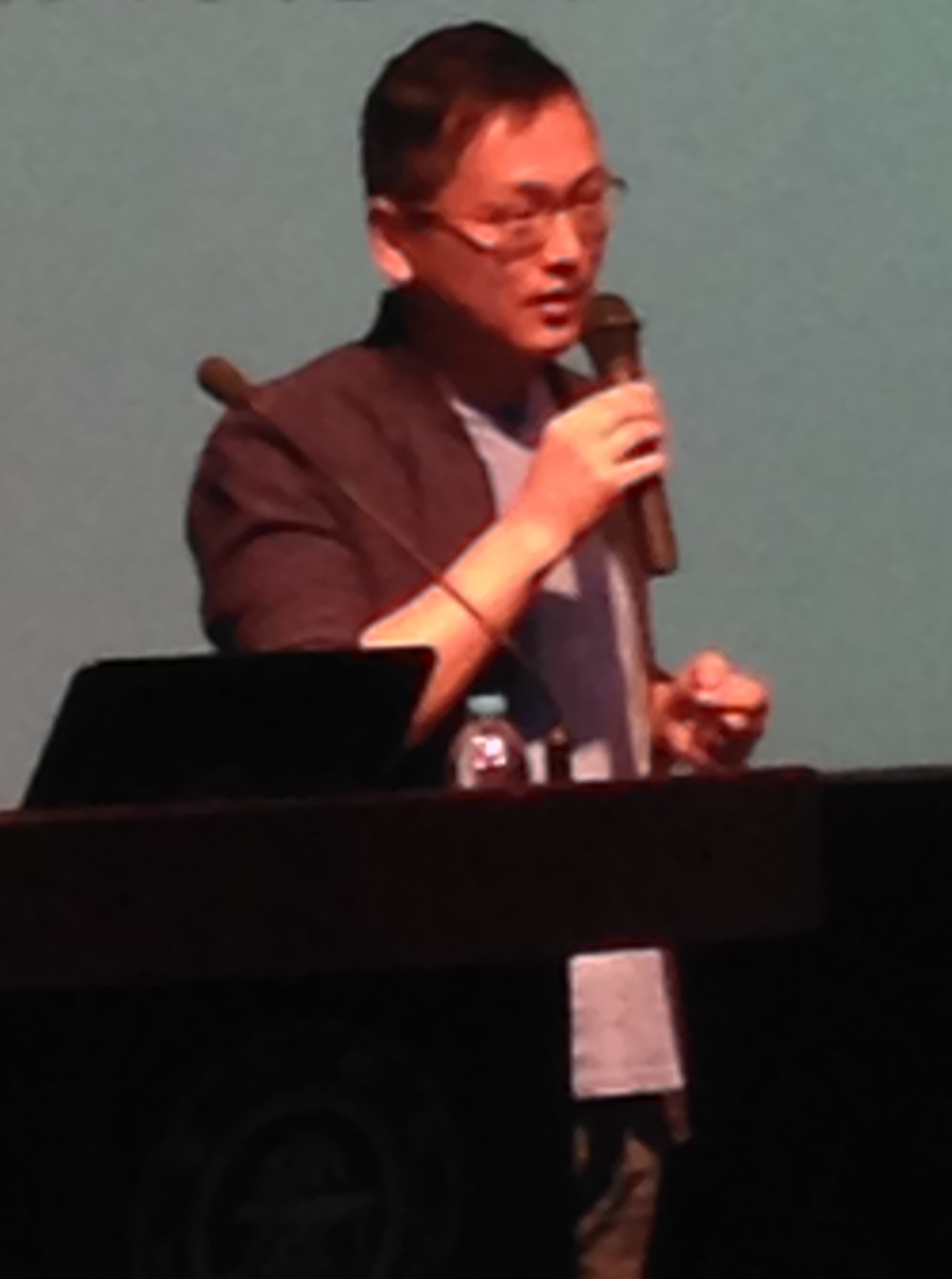 2014年9月18日，姬十三（嵇晓华）在上海交通大学演讲